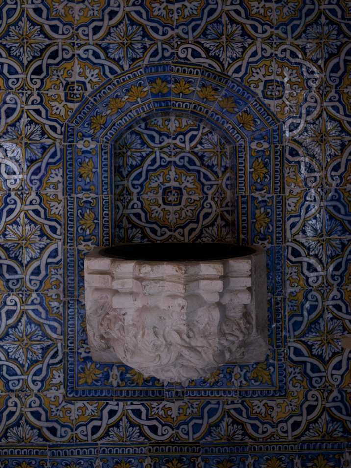 Pia de água benta, igreja de Santa Maria de Marvila, Santarém